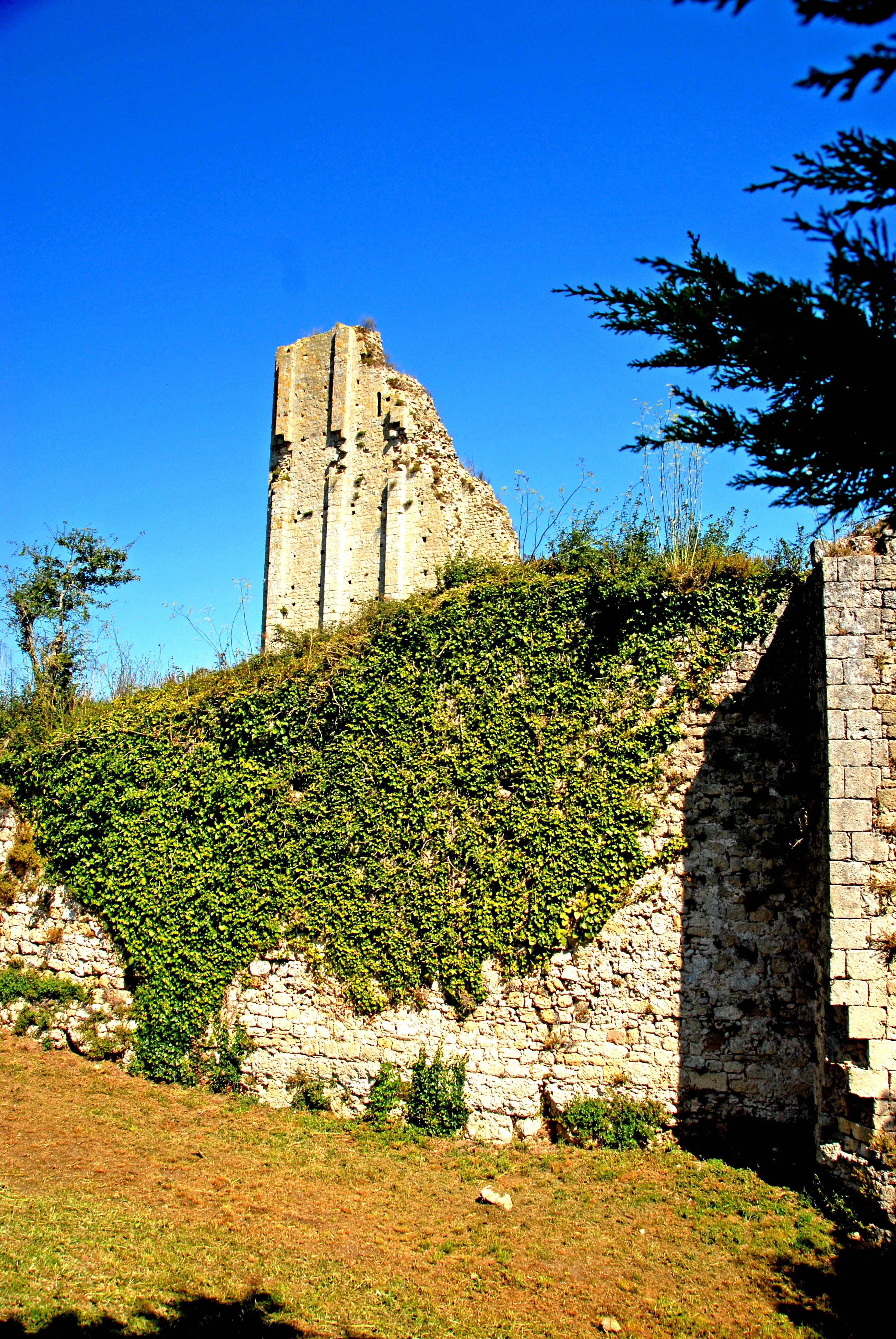 Tour-de-Broe, von Süden, mit Umfassungsmauer